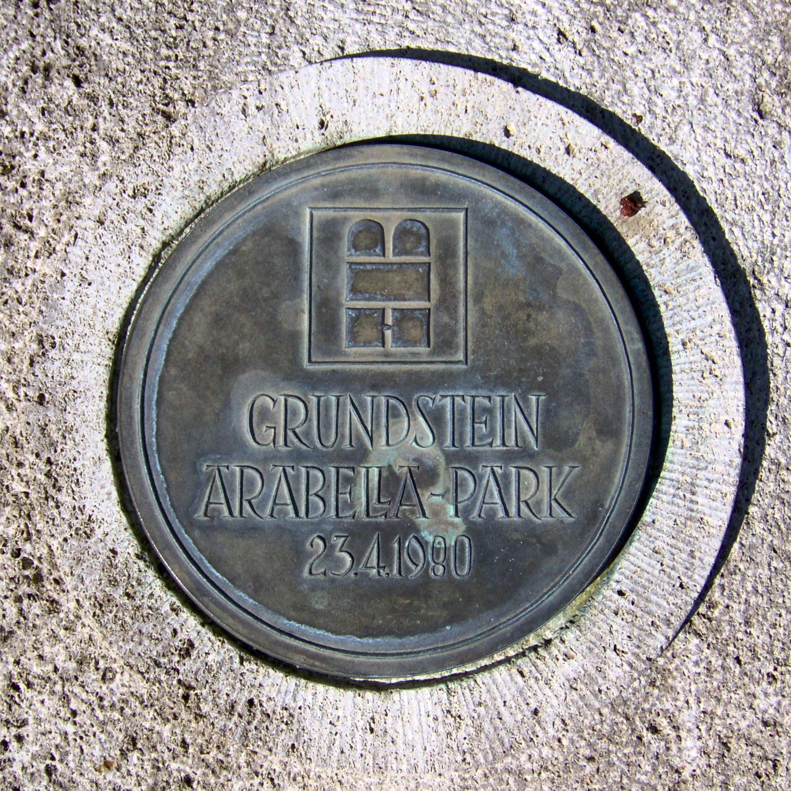 Die Inschrift des Grundsteines im Araballapark